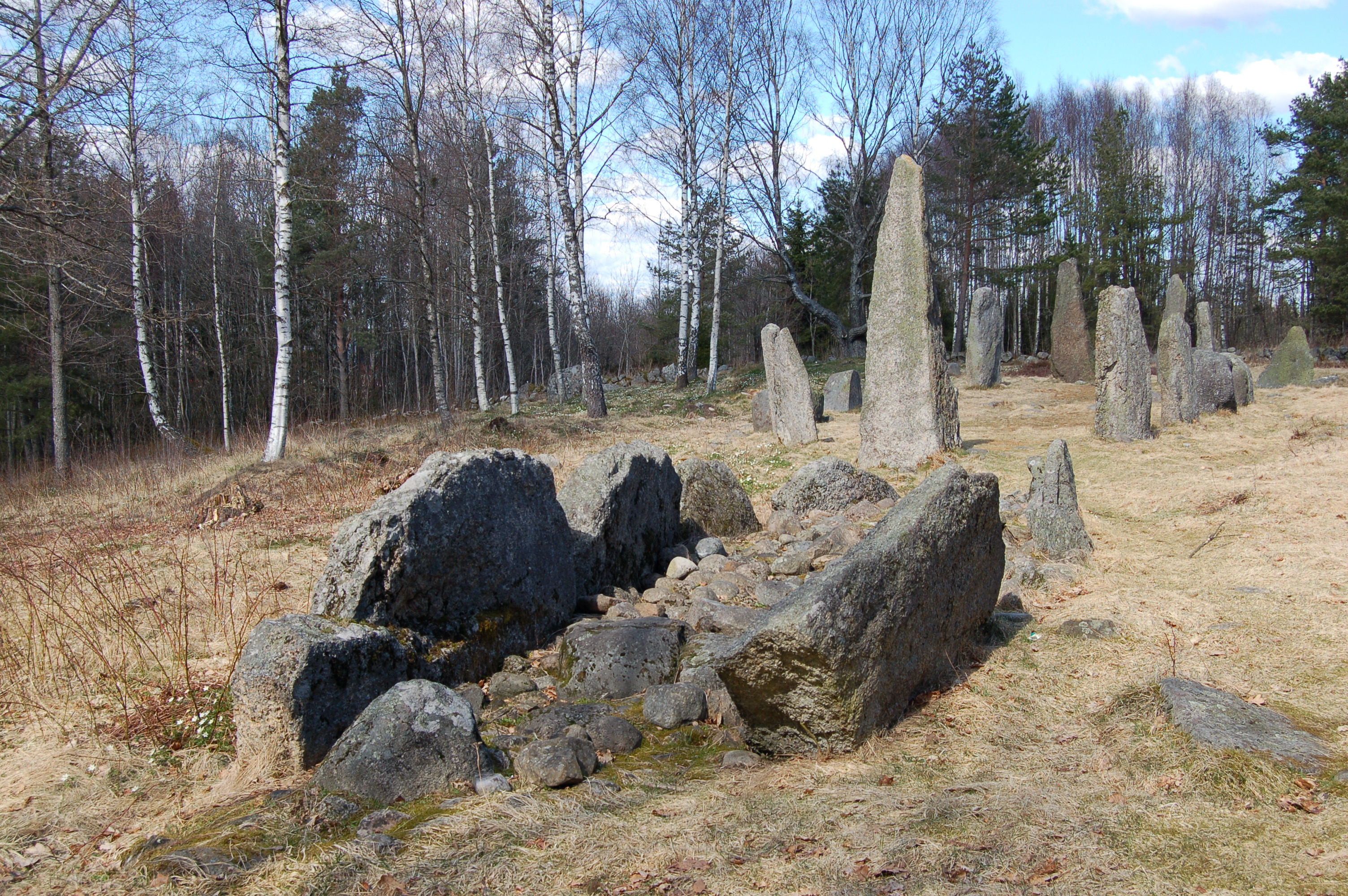 Istrehågan i Tjølling